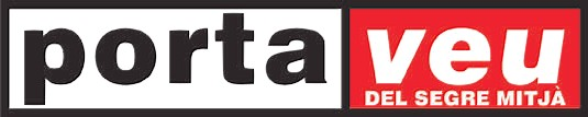 Cabecera de la revista comarcal "Portaveu del Segre Mitjà"